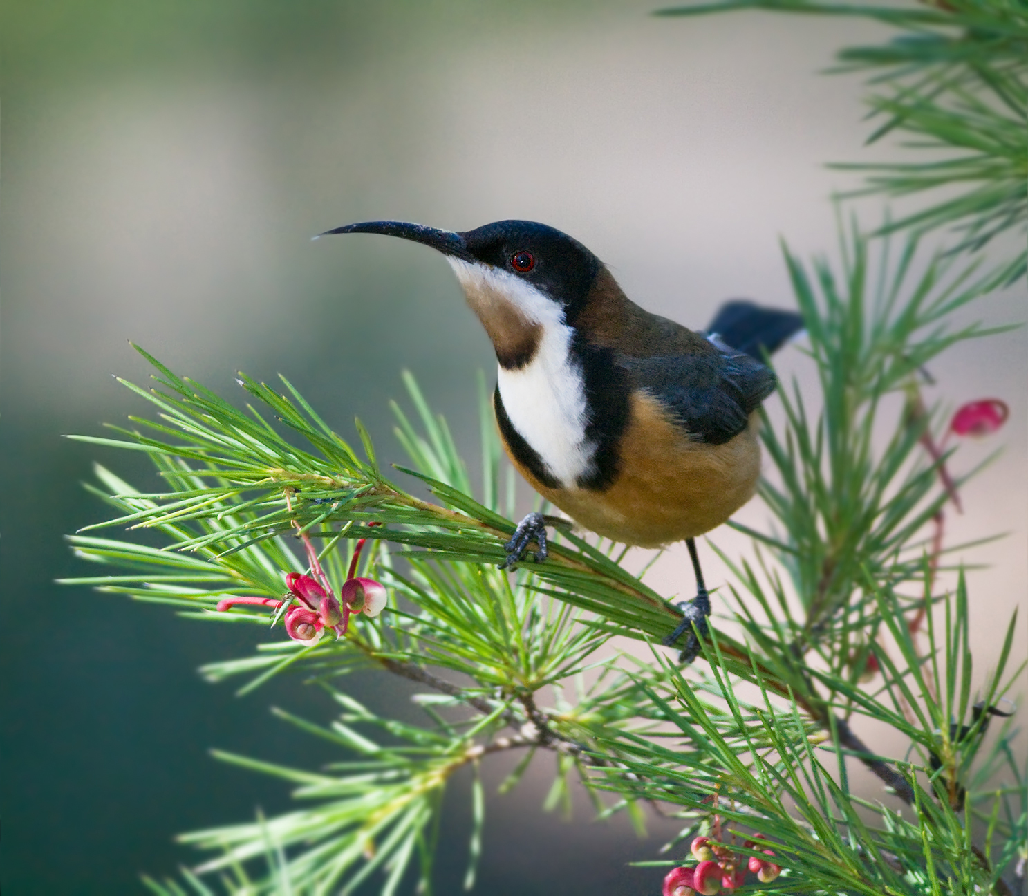 1.2 only